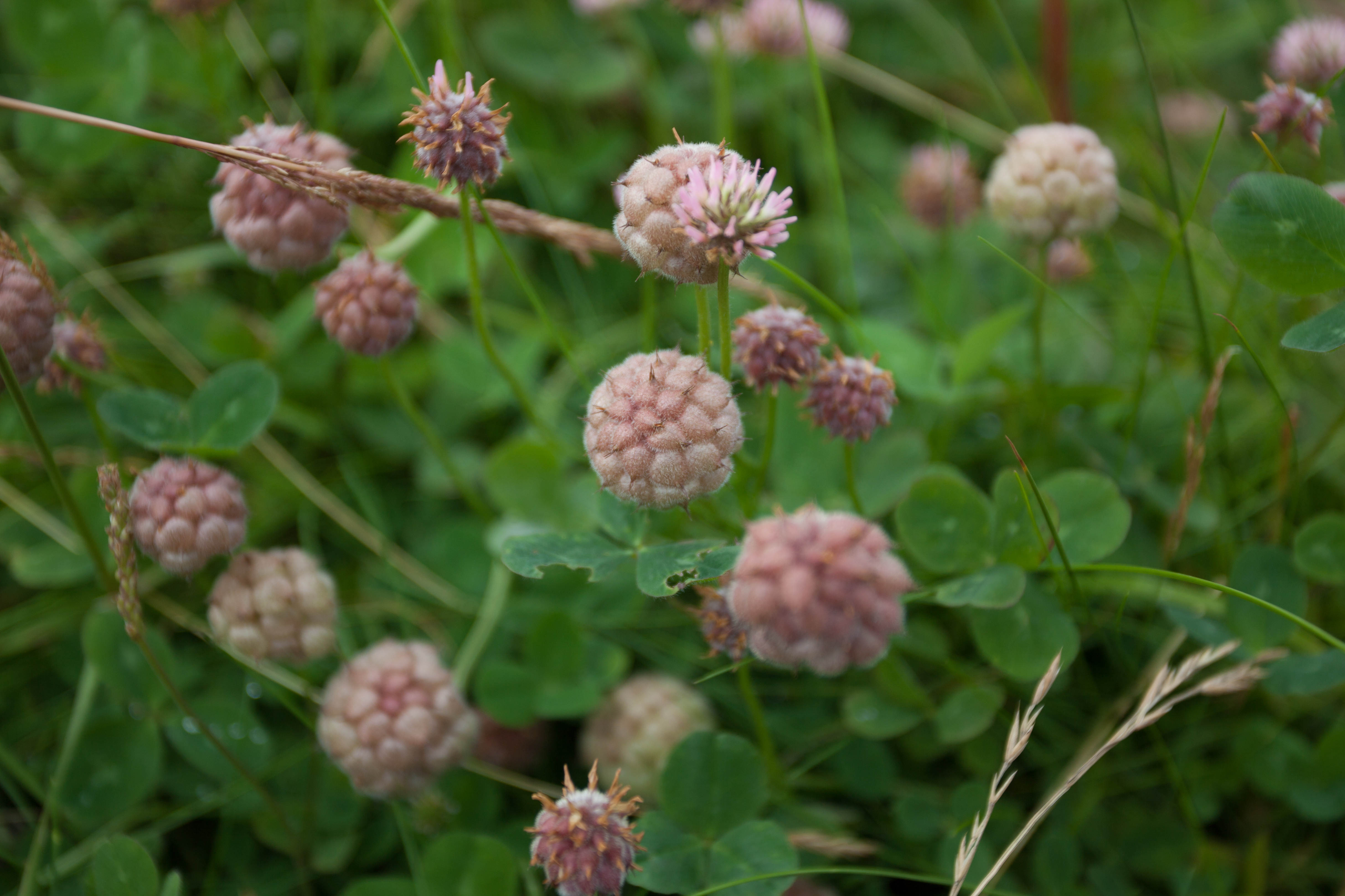 Vilt växande smultronklöver (Trifolium fragiferum) i Bohuslän.